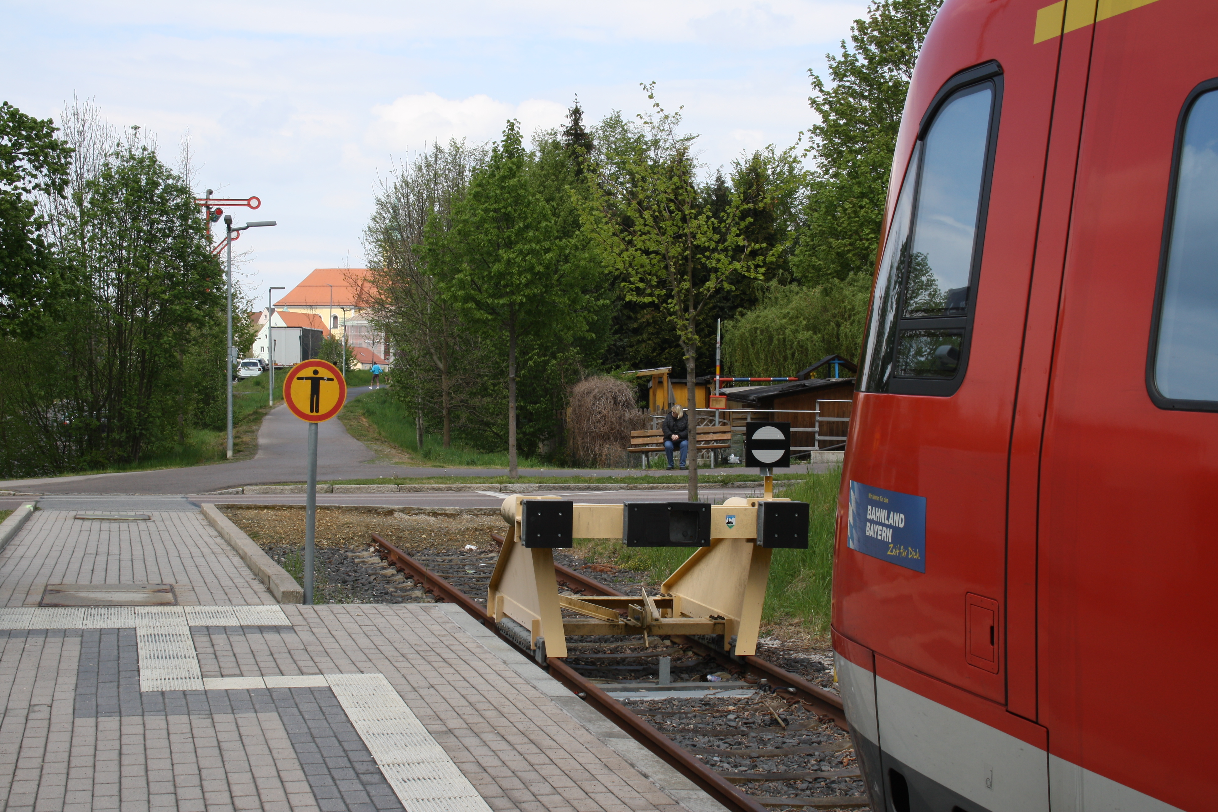 Haltpunkt Neustadt (Waldnaab)